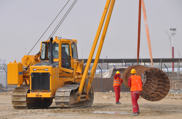 Układarka rur o max. udźwigu 33,1 t marki DRESSTA STALOWA WOLA